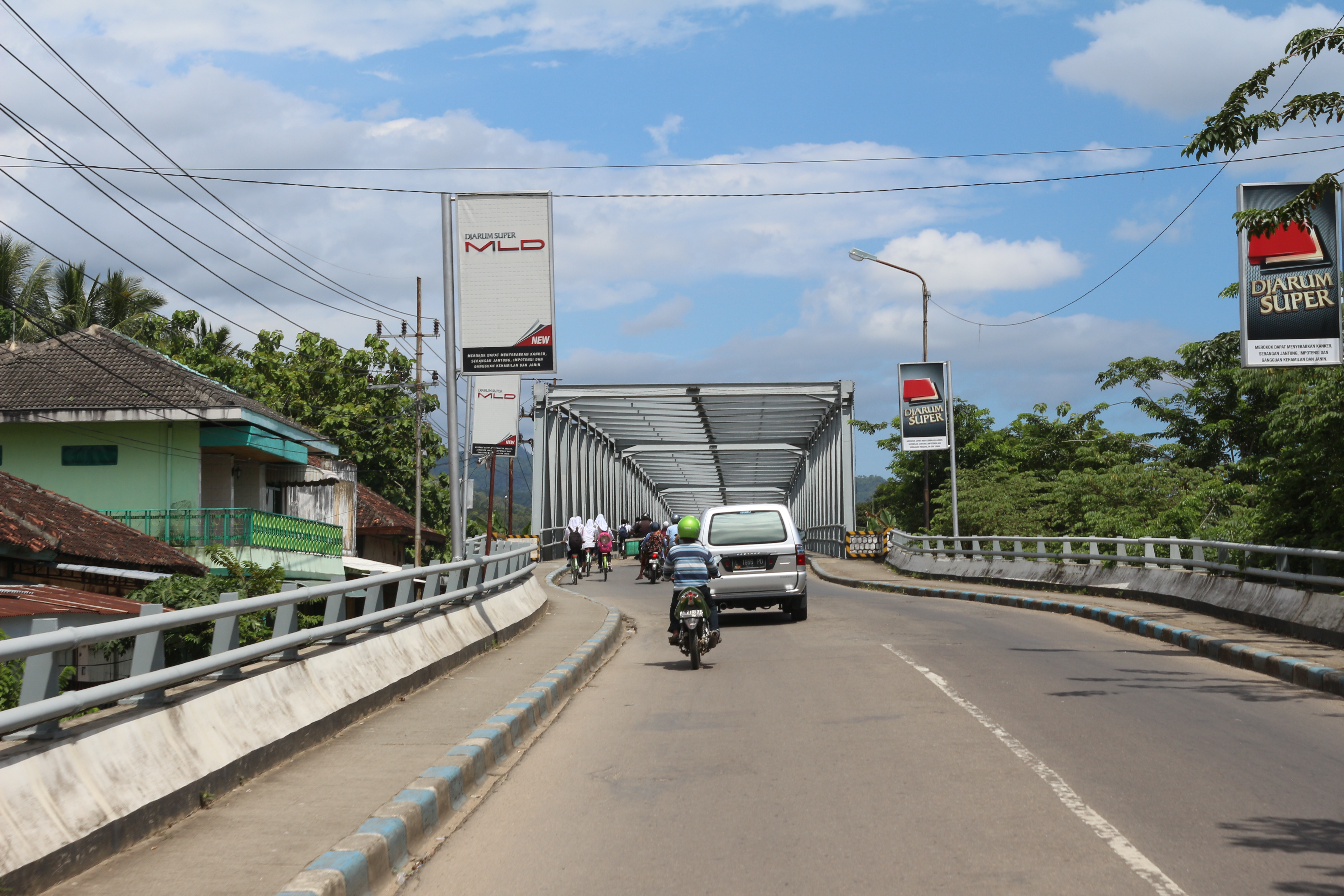 Jembatan Arjowinangun dr Barat